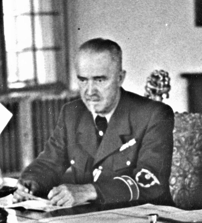 Ferdinand Wolsegger w gabinecie Hansa Franka na Wawelu